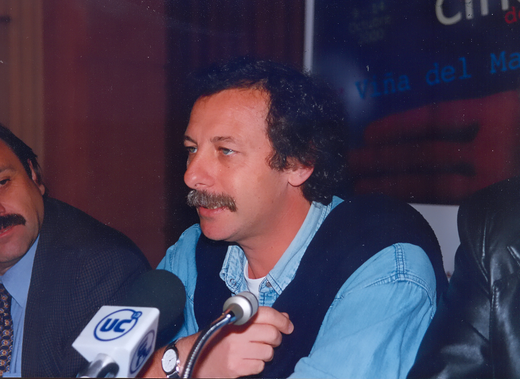 Director Alberto Lecchi (Argentina); Pelicula Nueces para el amor; año 2000